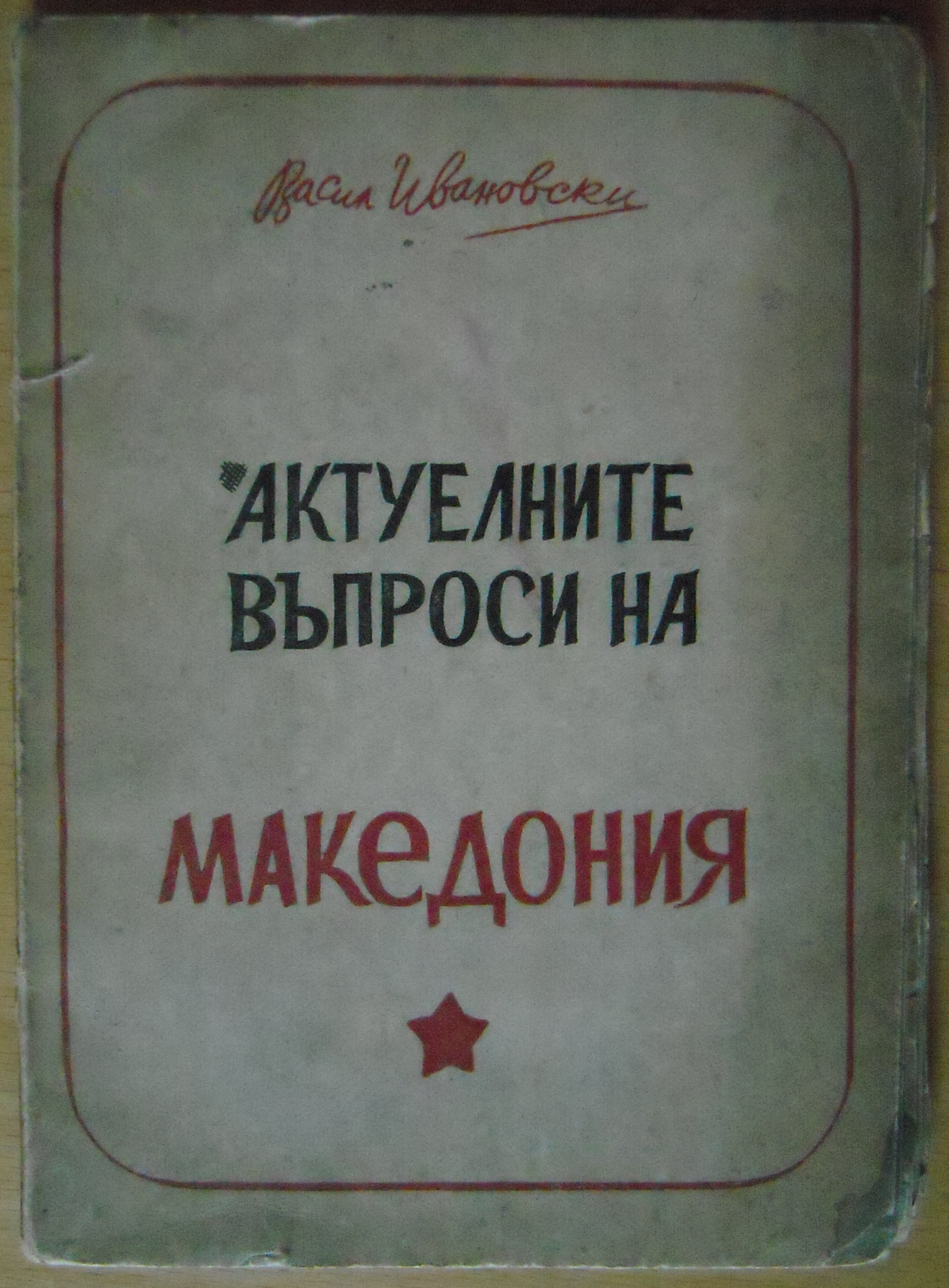 Корица на книгата на Васил Ивановски „Актуелните въпроси на Македония“.